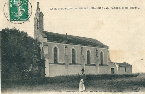 postcard de la Chapelle de Notre-Dame-de-Beldou